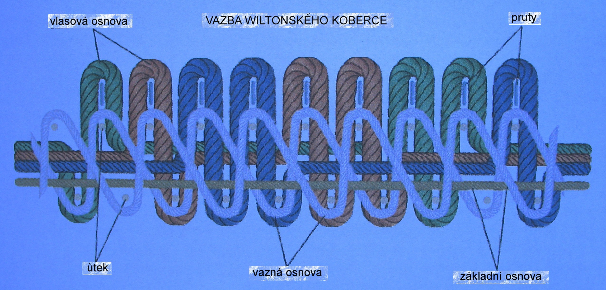 Die Struktur eines Wilton Teppichs